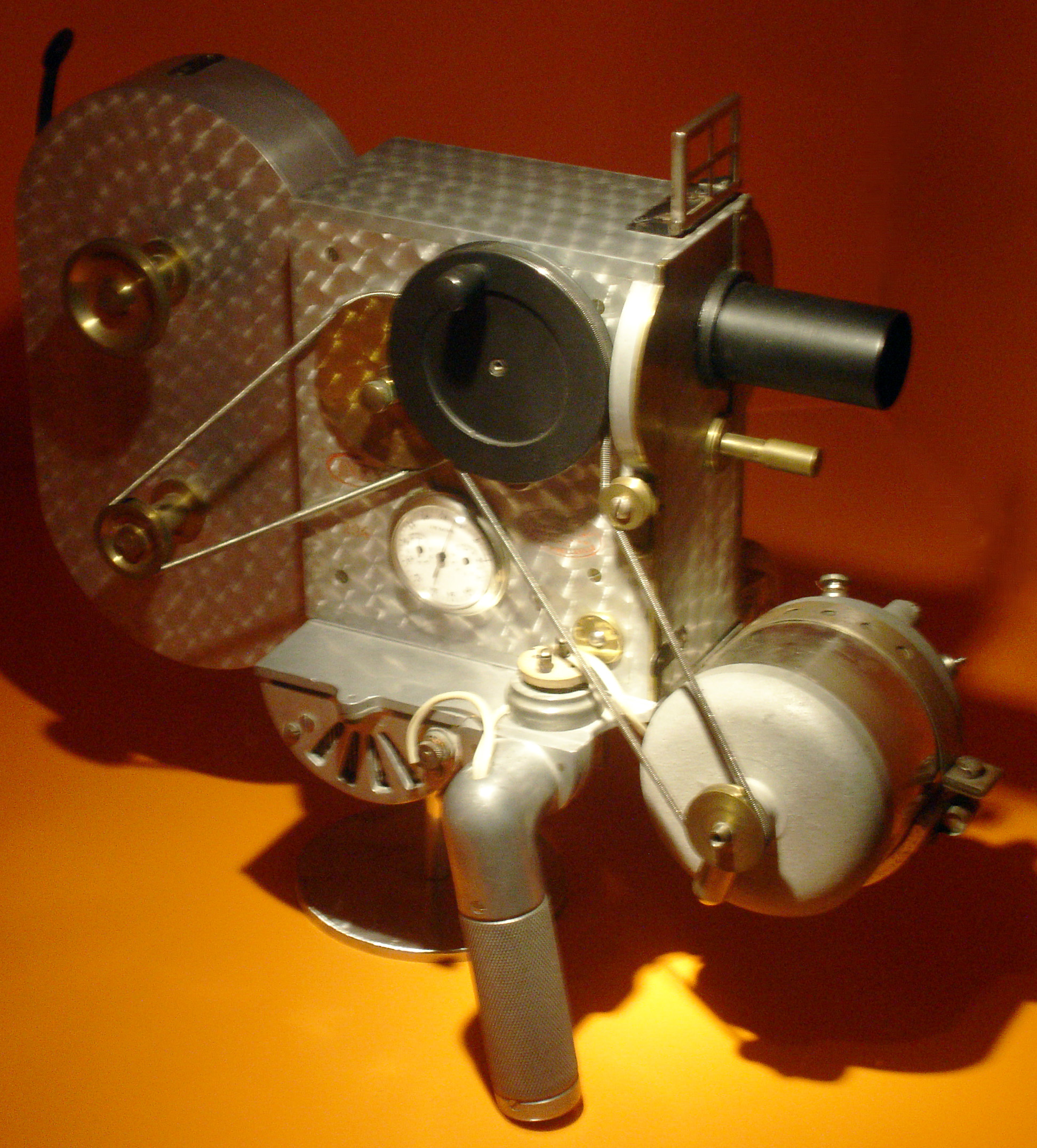 Caméra film 35 mm Cinex Bourdereau (1922). Portable à l'épaule. 5 kg.